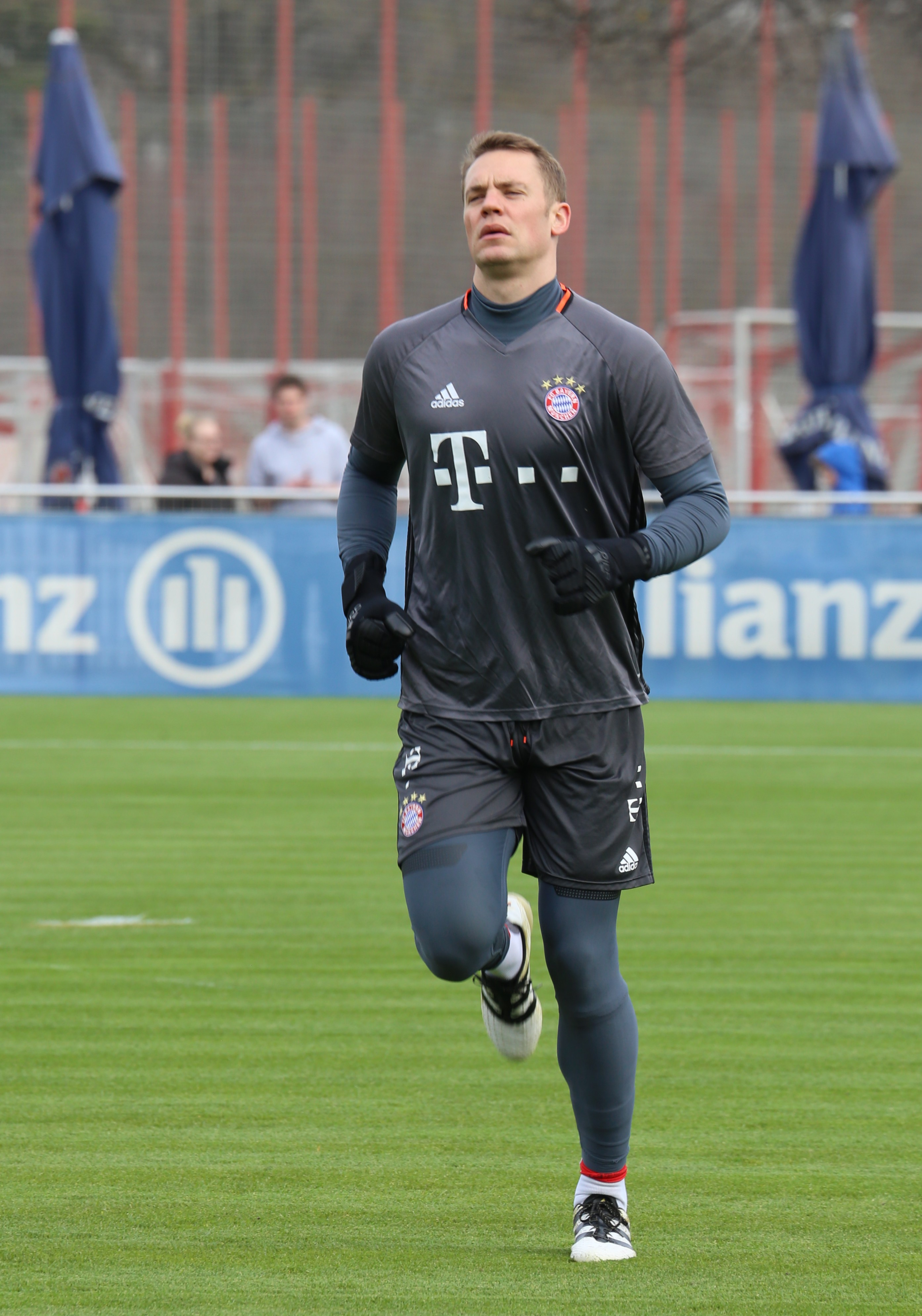 Manuel Neuer am 14. März 2017 beim Training auf dem Gelände des FC Bayern München